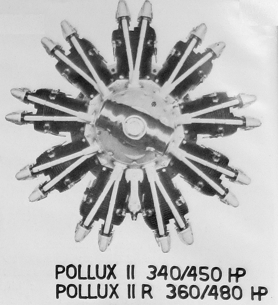 letecký motor Walter Pollux II-R (1934)